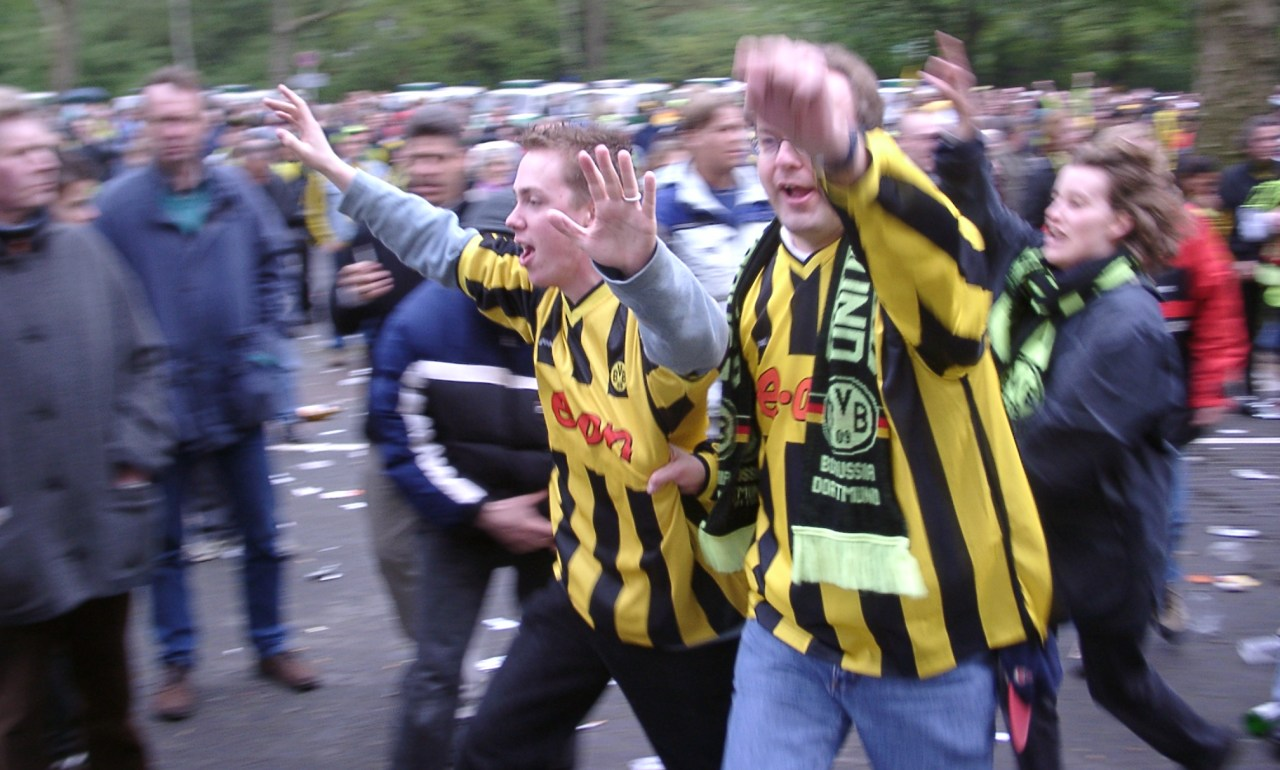 Wir sind Deutscher Meister